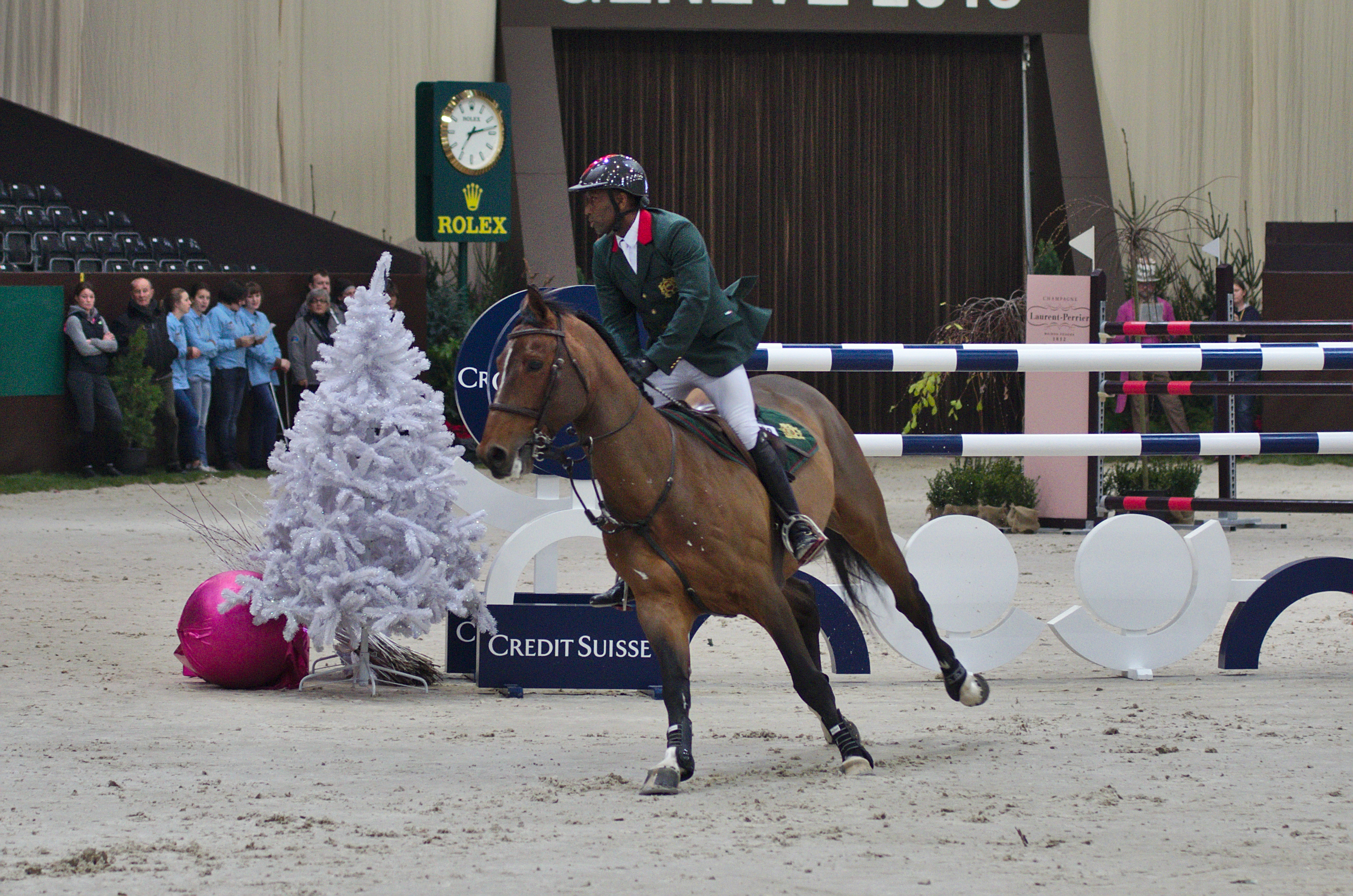 CHI Genève 2013 - 20131212 - Abdelkebir Ouaddar et Quickly de Kerisker